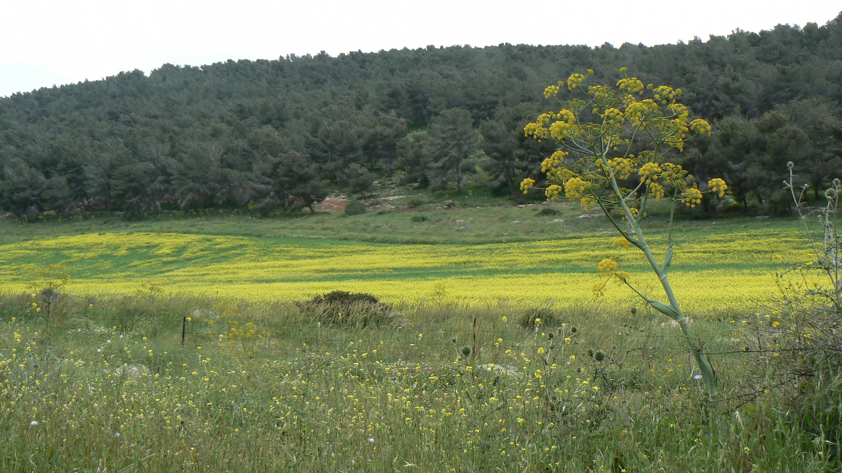 כאן הייתי חייב לעצור ולצלם את מרבד החרדלים. Mount Gilboa